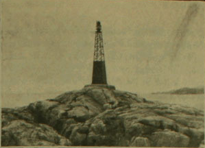 Faro Centinela, foto publicada en 1916